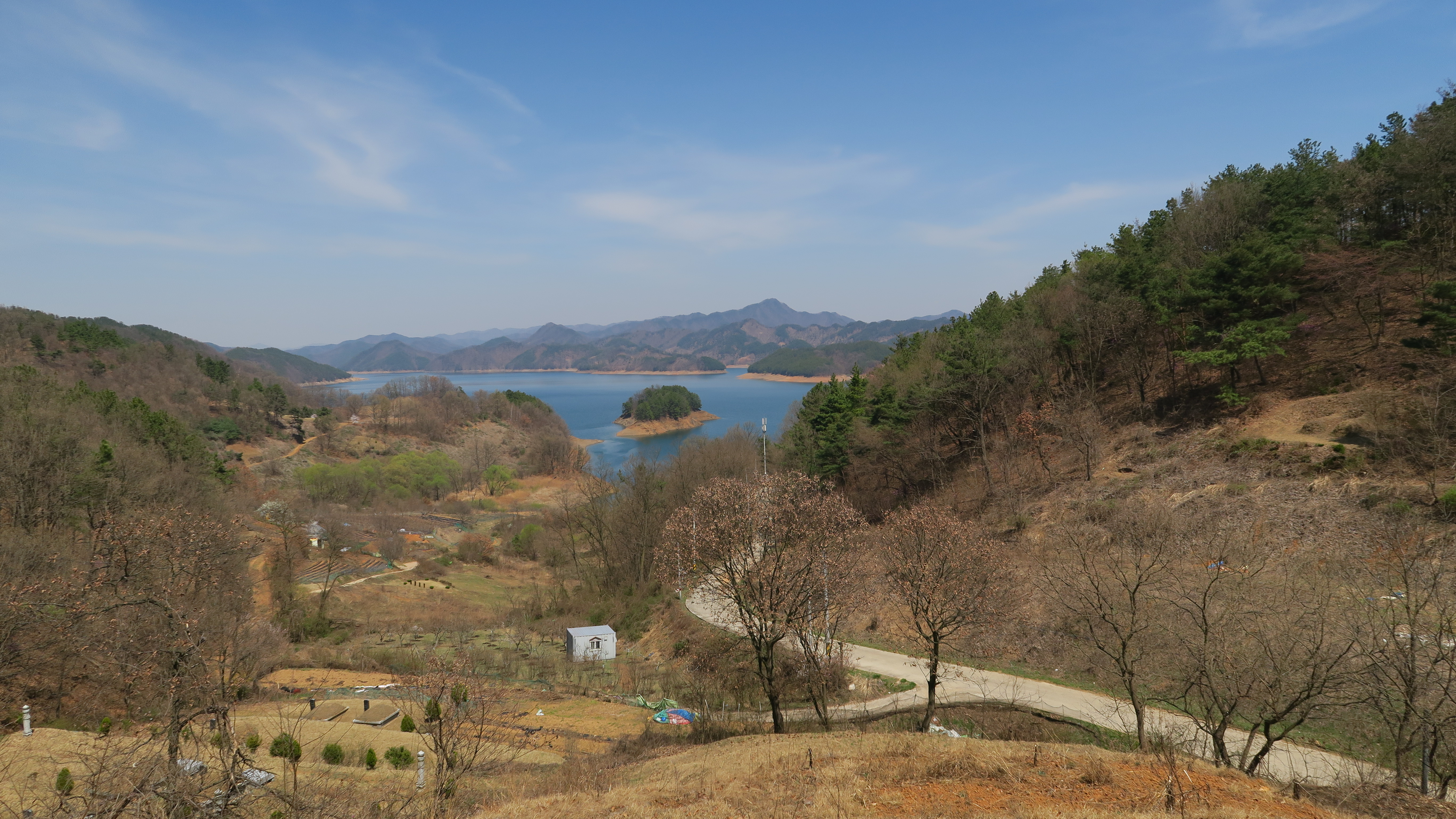 대청호오백리길 2구간_6